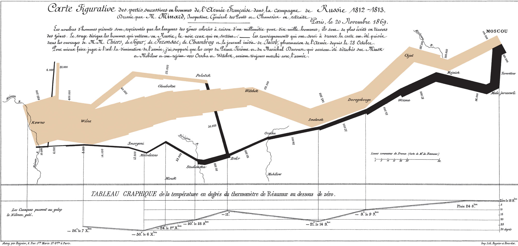 Prachtig voorbeeld van data-visualisatie; Napoleans Campagne naar Rusland in 1812. Het figuur toont 6 typen informatie: geografische locatie, de factor tijd, temperatuur, de route en richting van de troepen en het aantal (nog resterende) manschappen. Volgens Edward Tufte, schrijver van het boek 'The Visual Display of Quantitatieve Information', een bijbel voor statistici volgens The Economist, is dit de beste statistische grafiek aller tijden.